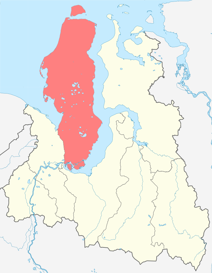 Район на карте Ямало-Ненецкого автономного округа